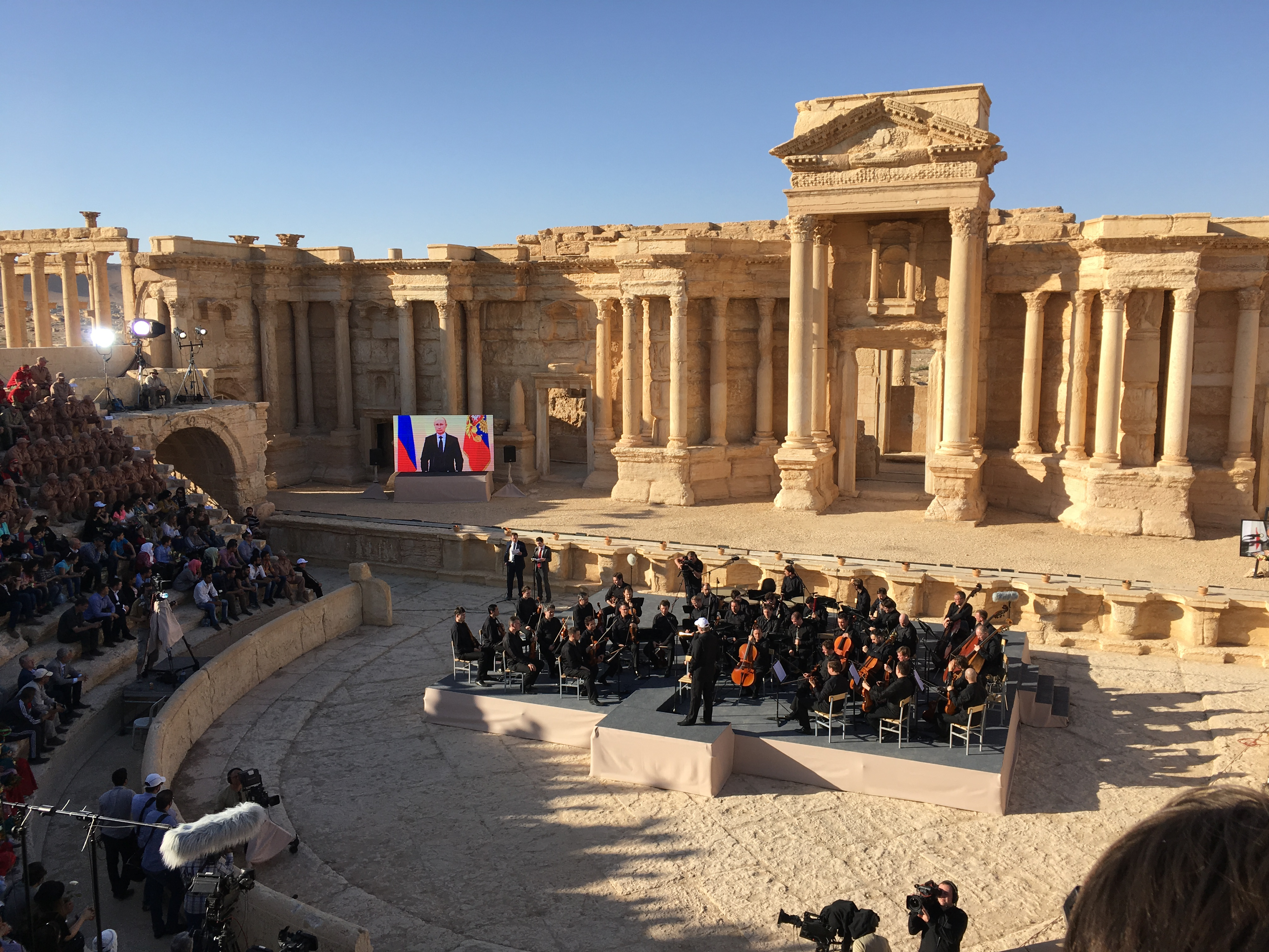 Palmyra concert